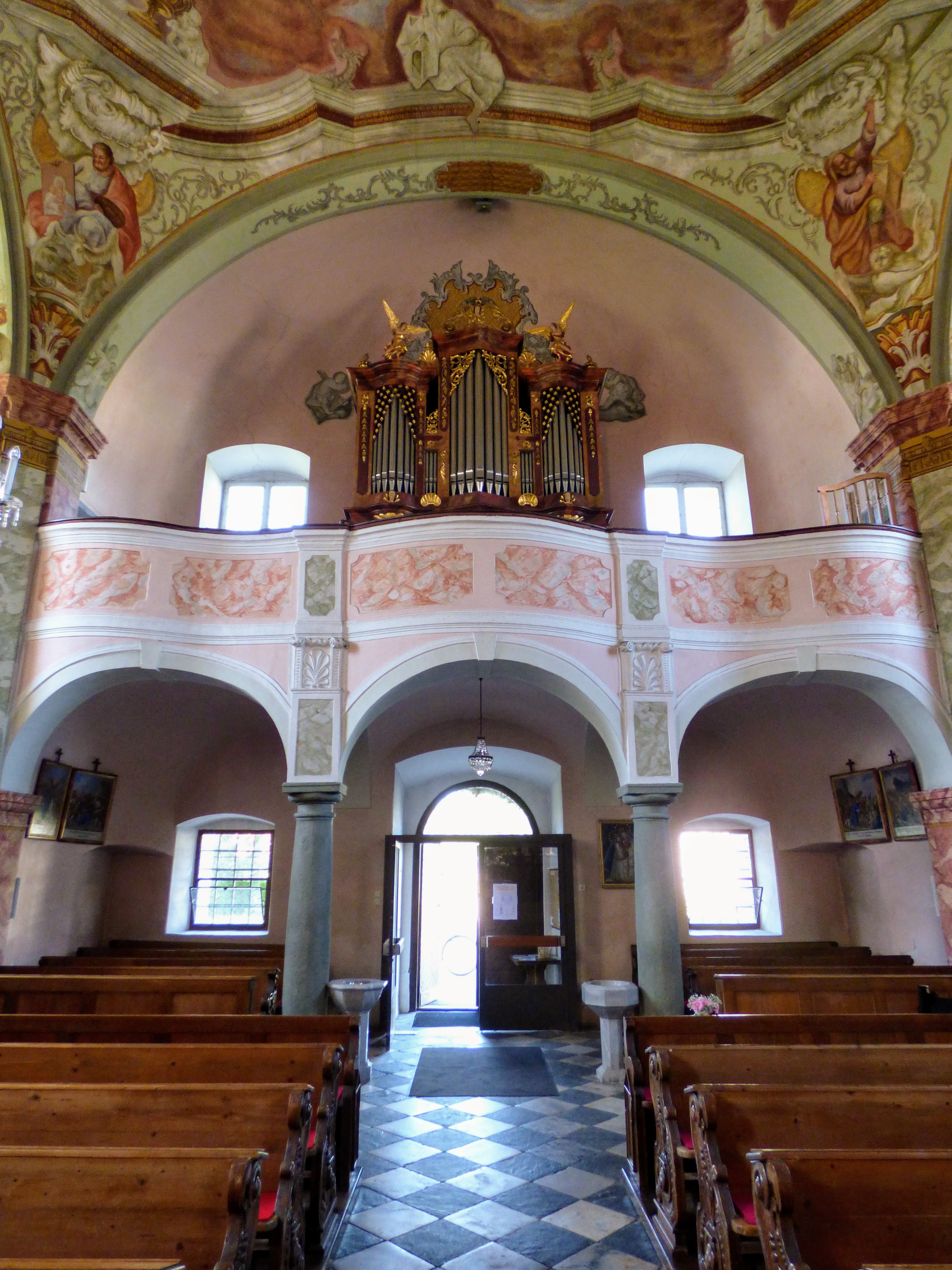 Inneres der Kath. Pfarrkirche Maria Hilf und St. Peter und Paul, Ebenthal in Kärnten